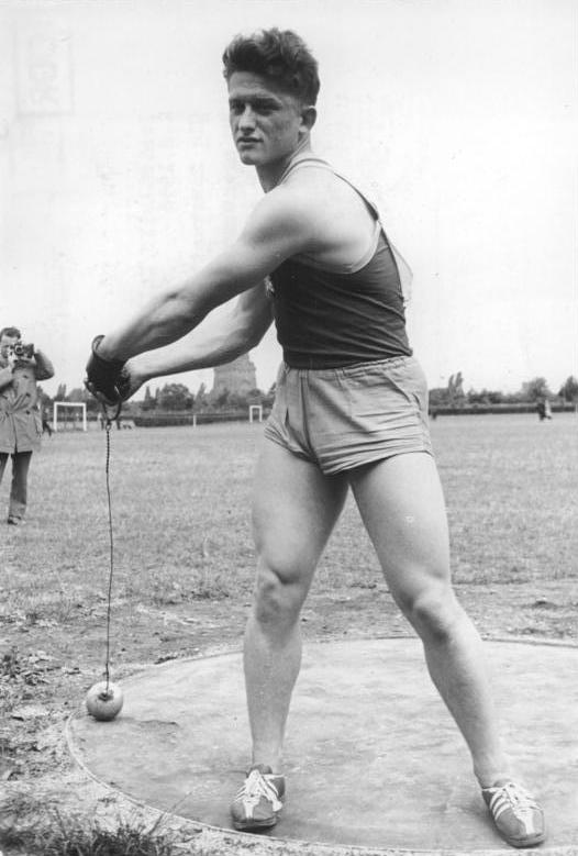 Niebisch Zentralbild Kollektiv 2.8.1956 Die Sportwettkämpfe begannen in Leipzig Am Donnerstag, dem 2.8.1958, wurden die Sportwettkämpfe im Rahmen des II. Deutschen Turn- und Sportfestes eröffnet. Im Bruno-Plache-Stadion wurde die Leichtathletik mit dem Olympischen Programm eröffnet. UBz: Im Hammerwerfen stellte Niebisch (ZSK Vorwärts) mit 56,56 m einen neuen DDR-Rekord auf.